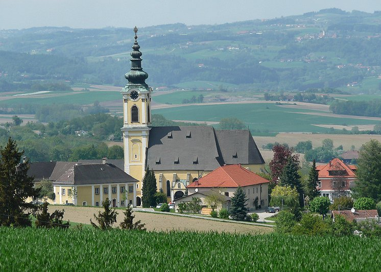 Blick auf Scharten, Oberösterreich